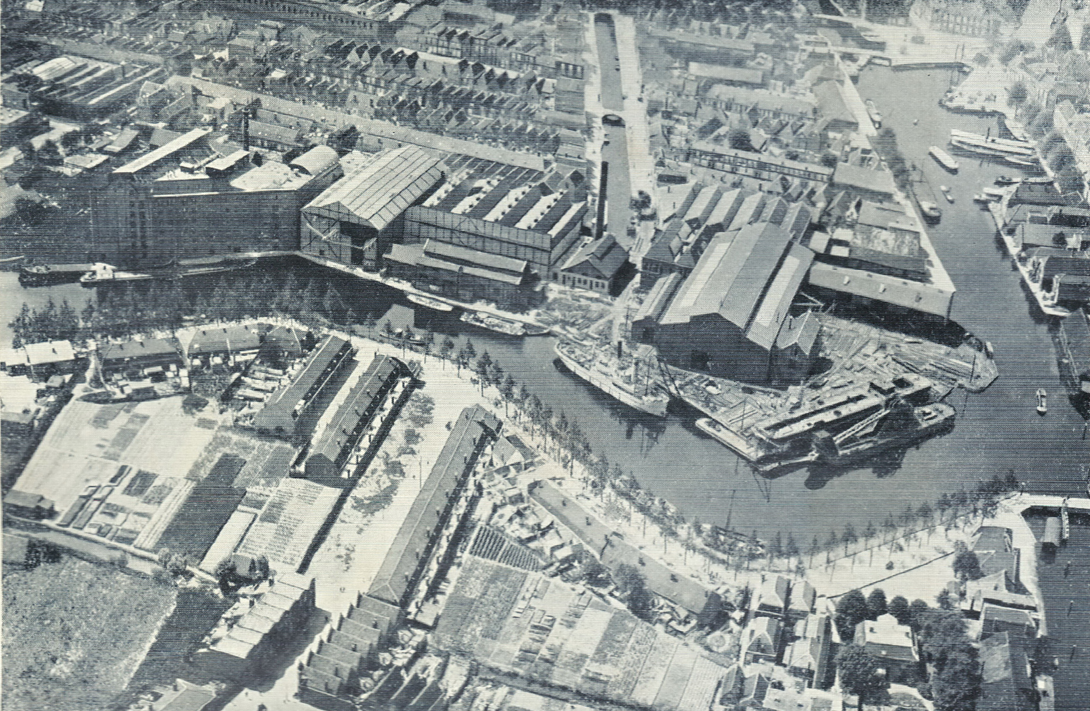 Koninklijke Nederlands Grofsmederij Leiden (ca 1925)